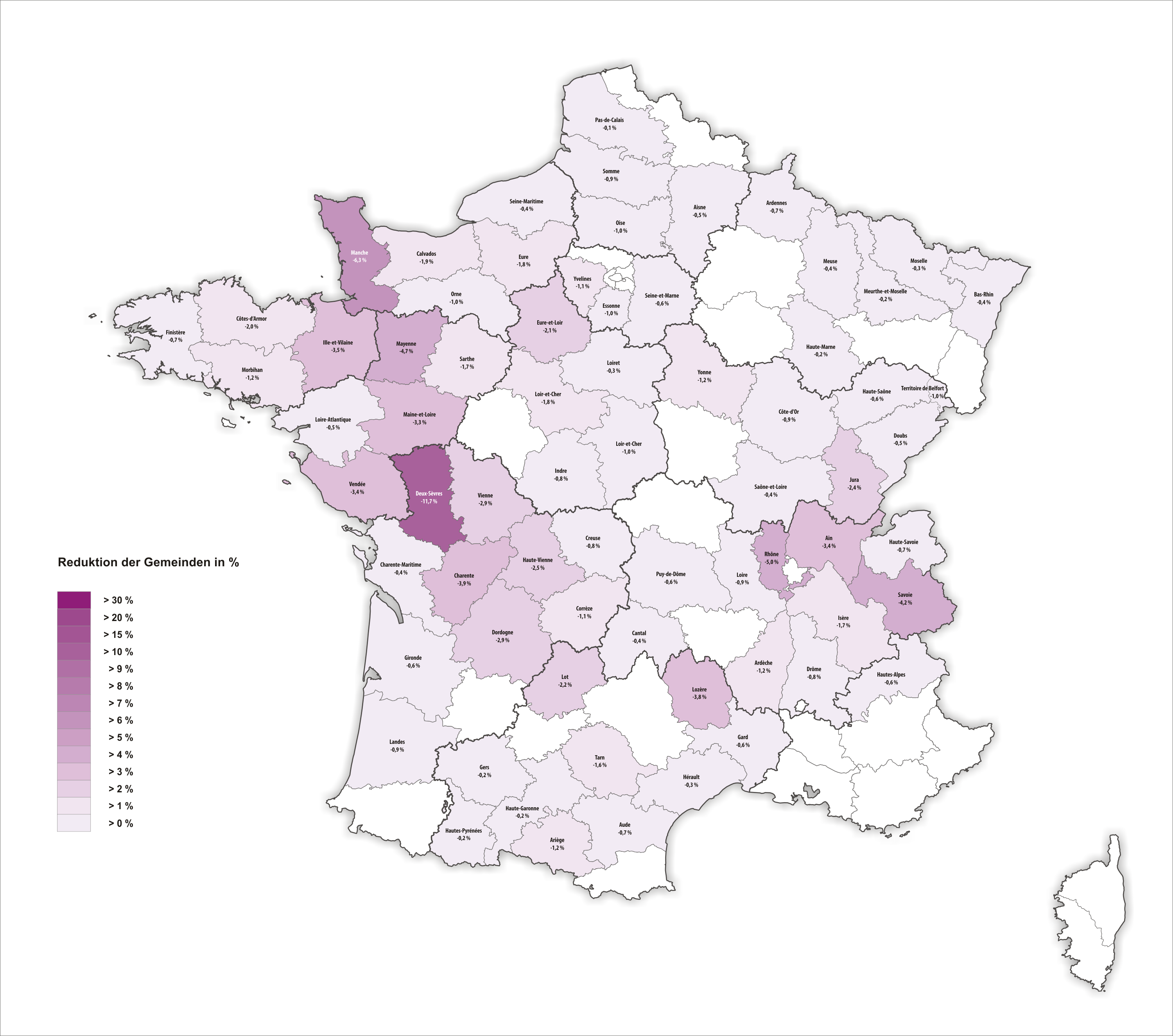 Reduktion der Gemeinden in Frankreich durch Fusionen pro Département